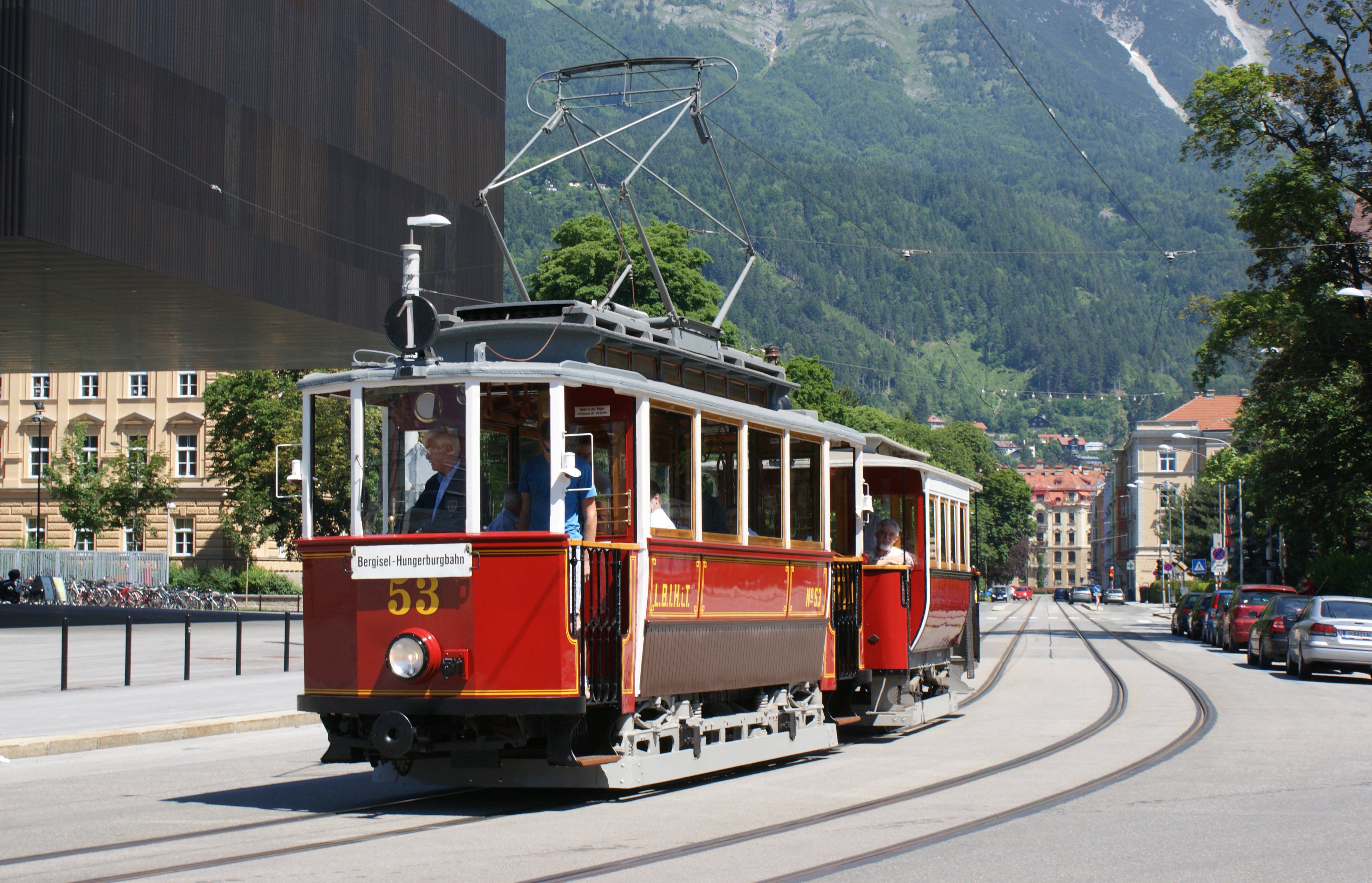 Triebwagen 53 und Beiwagen 111 der Tiroler MuseumsBahnen in der Claudiastraße